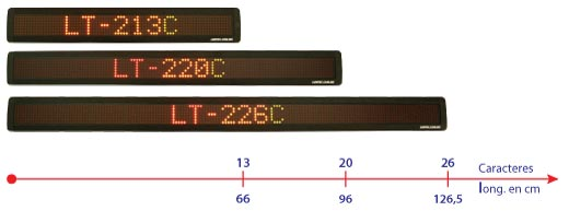 Unilíneas: relación entre longitud y cantidad de los cáracteres